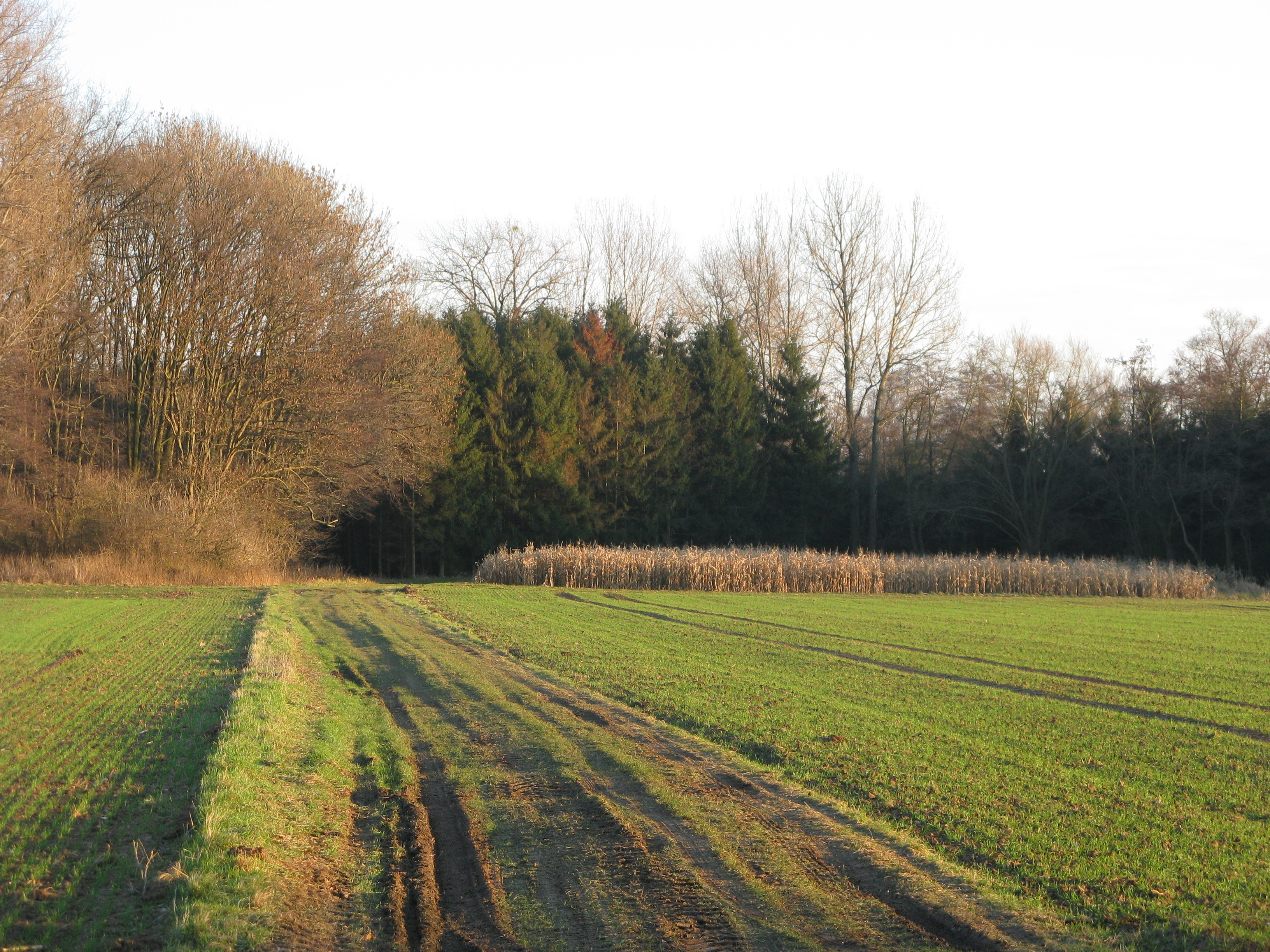 Randgebiet des NSG „Lahder Marsch“, Petershagen, Deutschland.